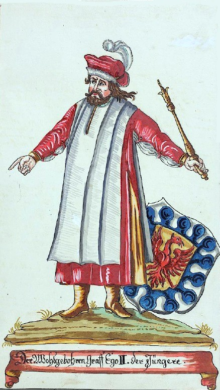 Egon der Jüngere, Graf von Urach und 1. Graf von Freiburg; die Original-Bildunterschrift ist irreführend. Auf den Folgeseiten wird Adelheid von Neuffen als Ehefrau dieses Egon II. genannt, womit er gemäss Kindler von Knobloch als Egino V. von Urach gezählt wird